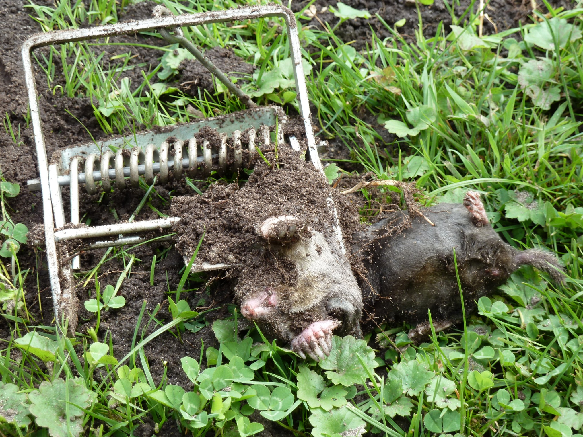 Ein in der Falle gelaufen Maulwurf